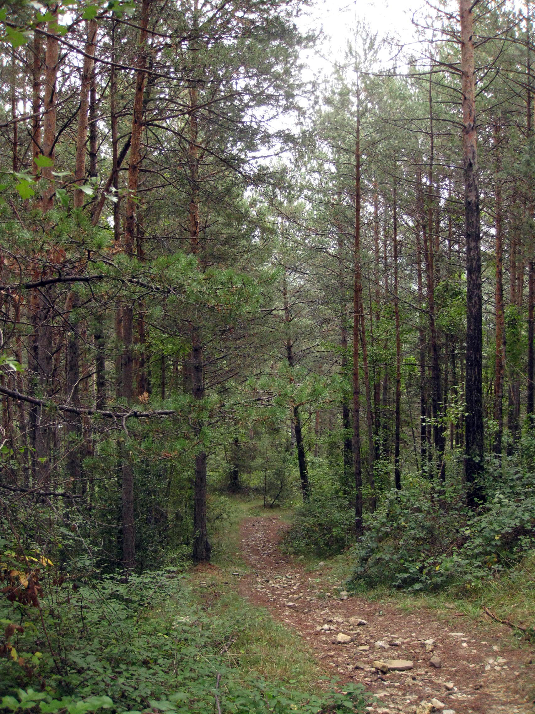 Serra del Catllaràs This is a a photo of a natural area in Catalonia, Spain, with id: ES510190